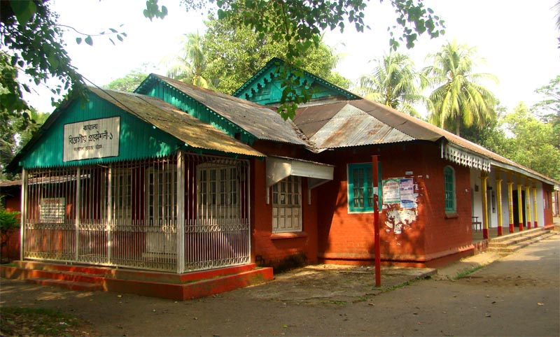 প্রাক্তন ইউরোপিয়ান ক্লাবের বর্তমান চিত্র।